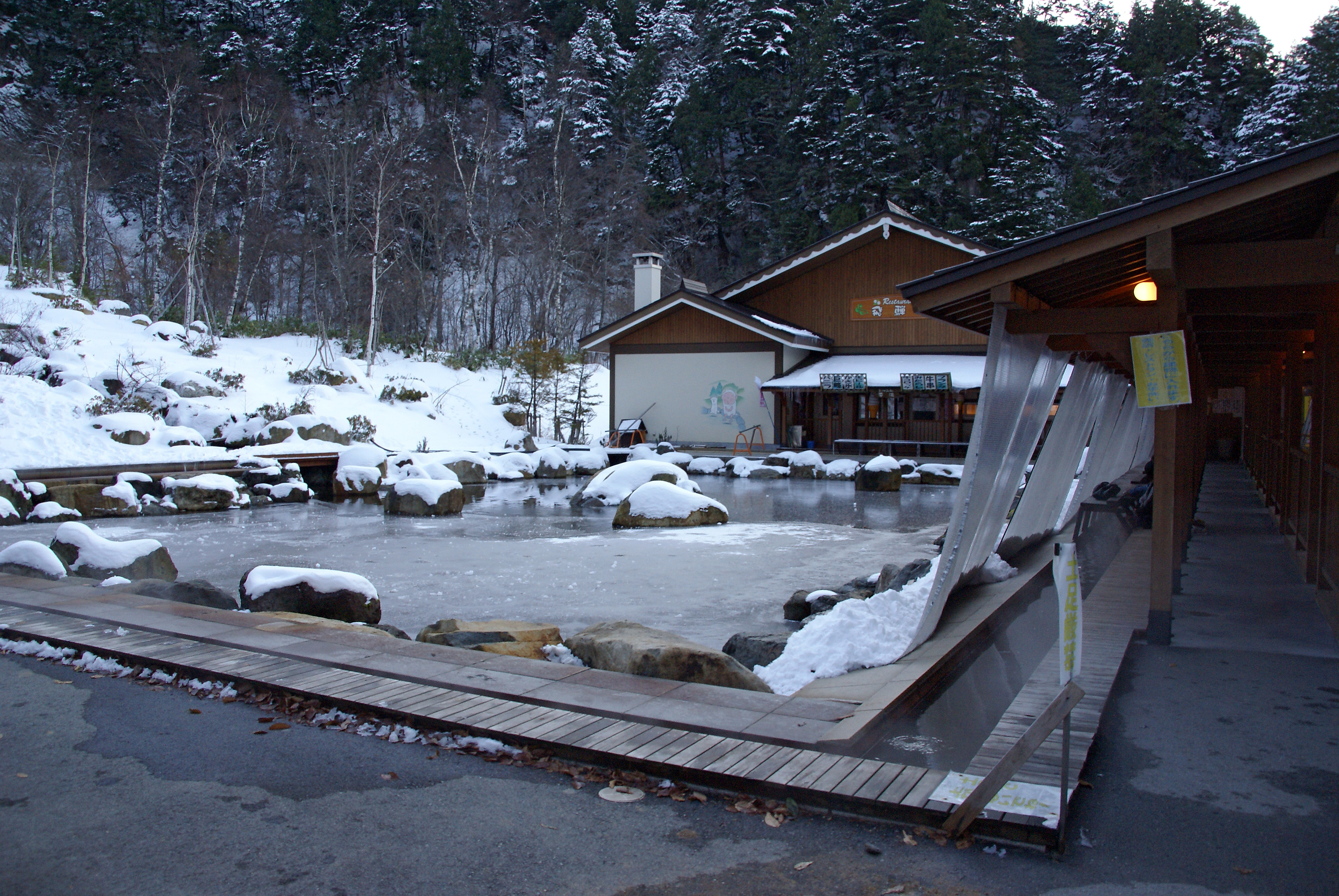 Hirayu-otaki-koen in Takayama, Gifu prefecture, Japan